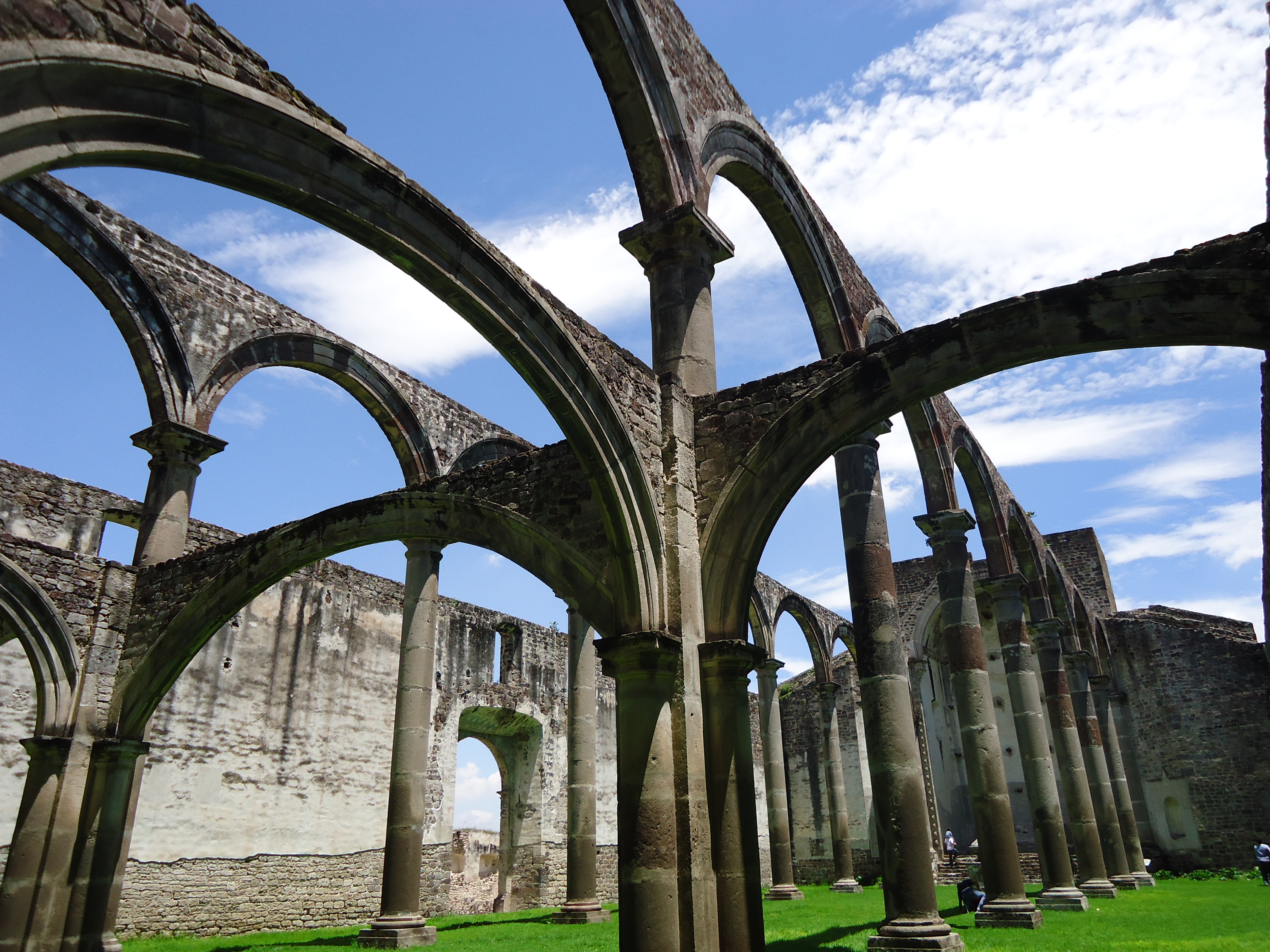 Ruinas del franciscano Ex-convento de Tecali de Herrera (construido durante el siglo XVI) — en Tecali de Herrera, el estado mexicano de Puebla.